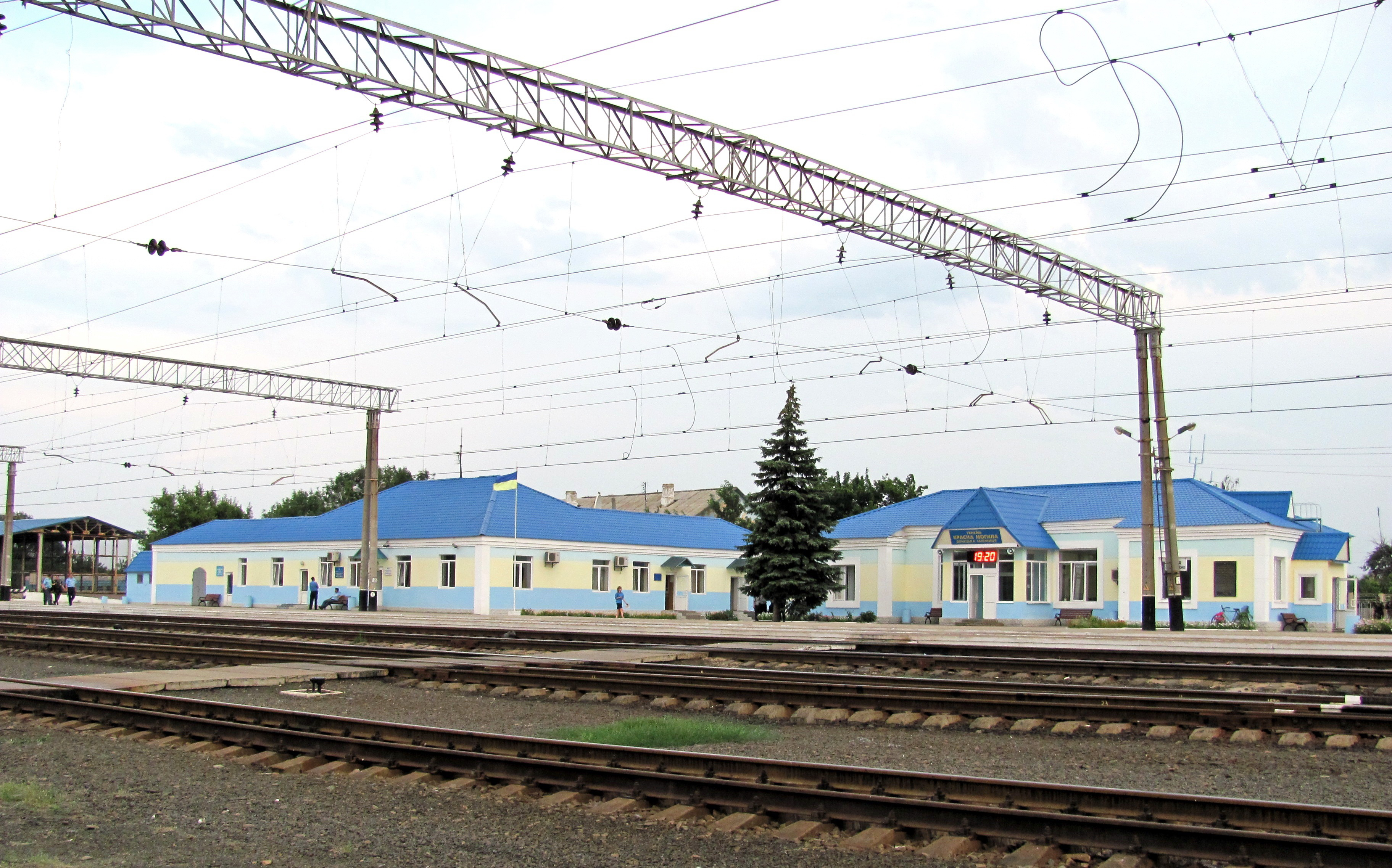 Червонопартизанск